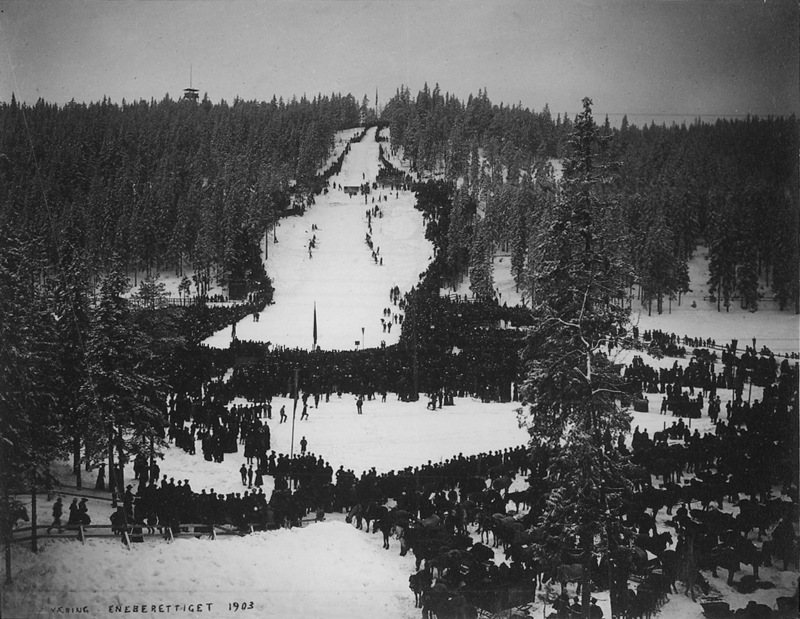 Holmenkollbakken